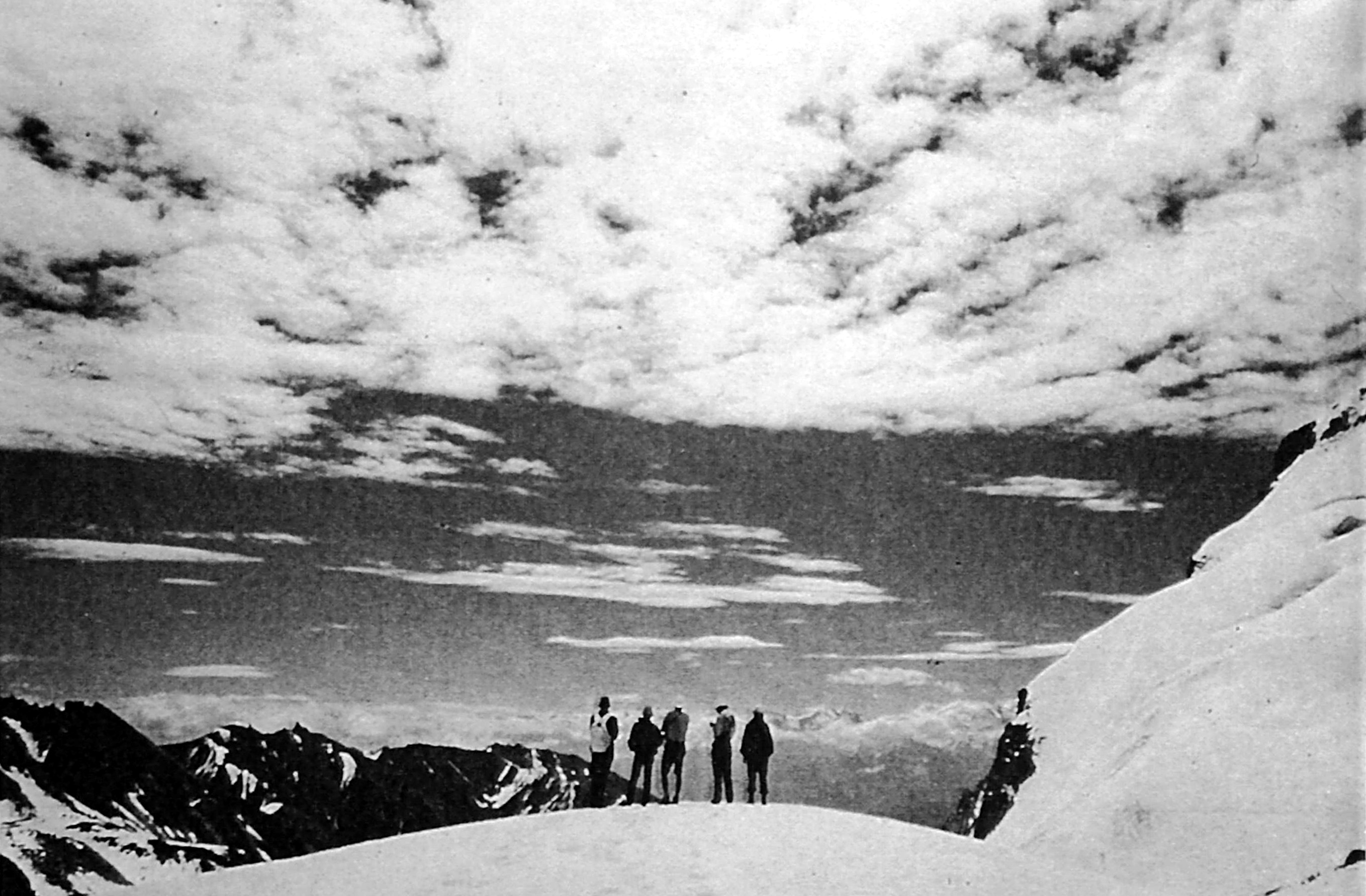 Alai Abramow-Gletscher Blick zum Pamir Pik Kommunismus Pik Korschenewskaja